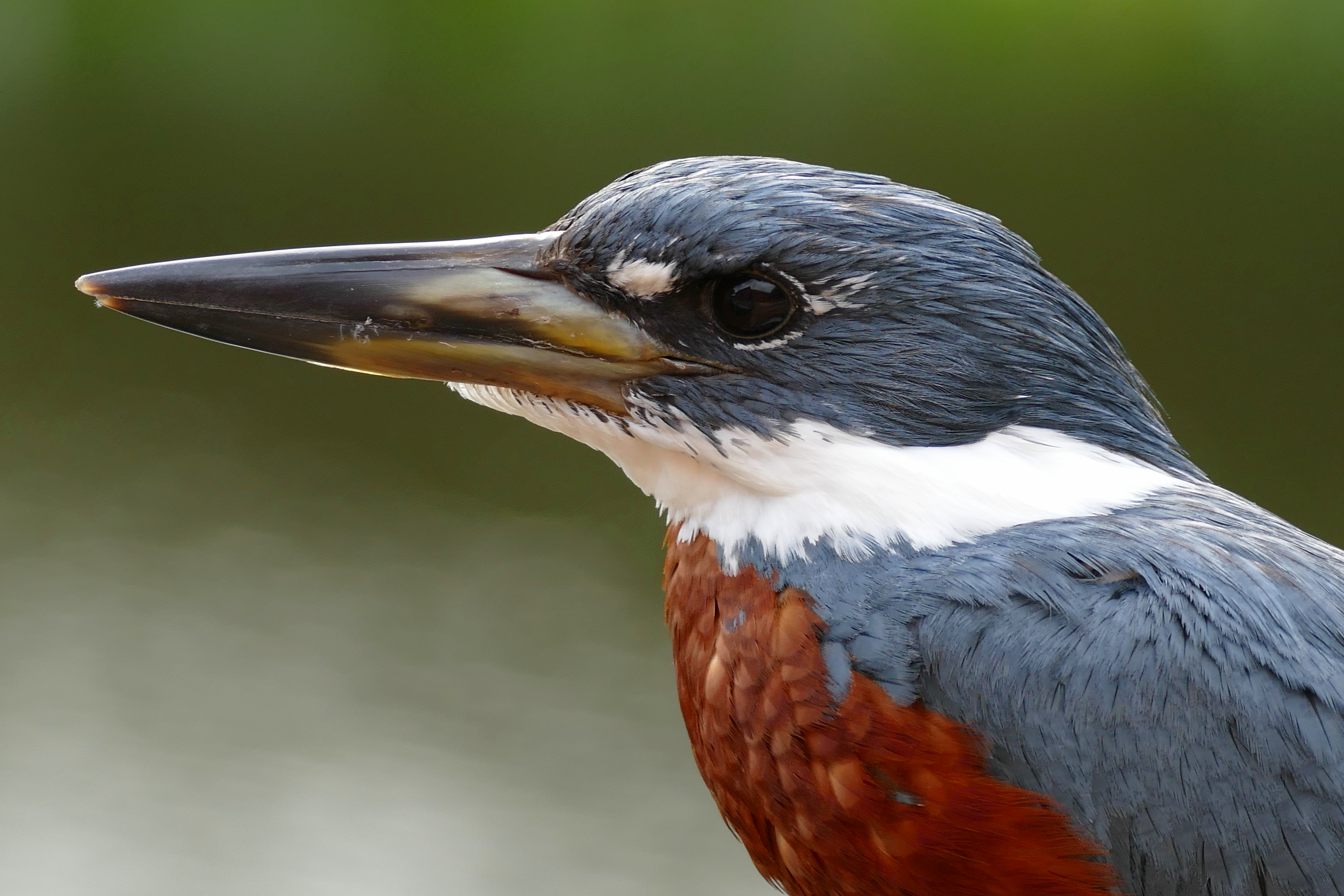 Hotel Pantanal Norte, Pixaim, Transpantaneira, Poconé, Mato Grosso, BRAZIL